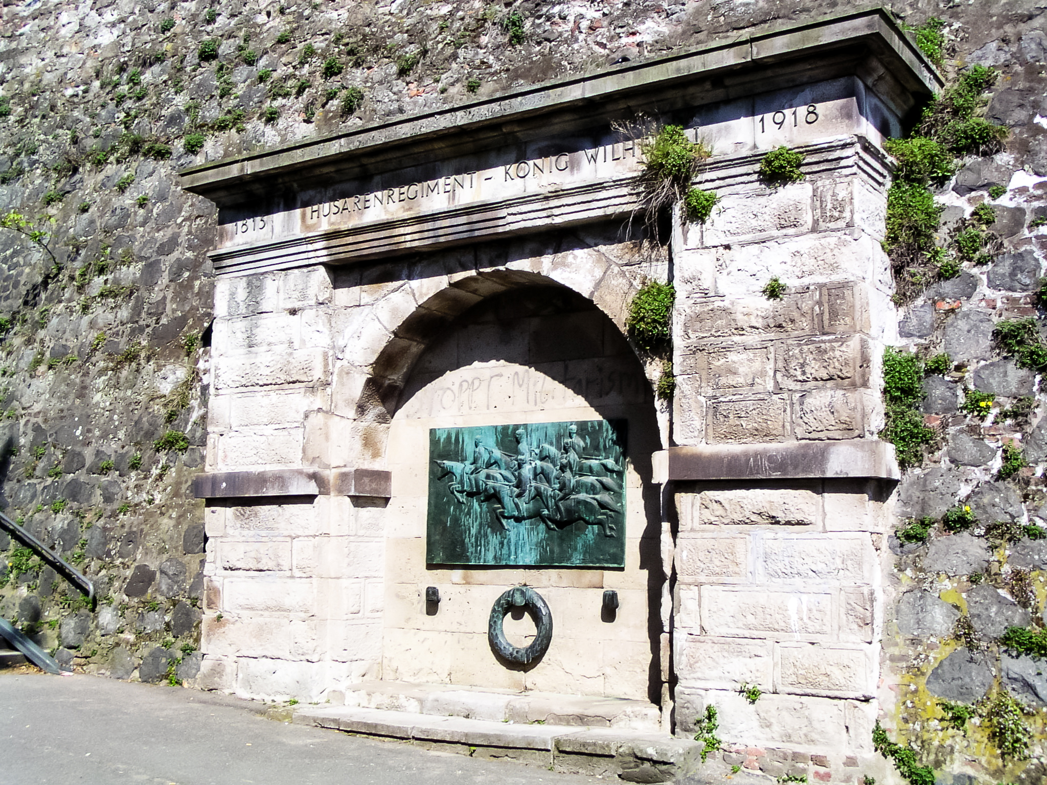 Das Husarendenkmal oder Husarenrelief wurde 1962 von Ernemann Sander geschaffen und am 9. Juni 1963 eingeweiht. Die 80 Kilogramm schwere Bronzeplatte wurde in das vorhandene Kasemattentor am Alten Zoll eingelassen und zeigt sechs Reiter, am unteren Rand der Platte befindet sich das Wappen und der "Schlachtruf" der Husaren: "Lehm op". Das ursprünglich ebenfalls auf der Platte angebrachte Emblem König Wilhelms I. ist zwischenzeitlich verschwunden. Über dem Architrav des Kasemattentors ist eine Inschrift eingemeißelt: "Husarenregiment König Wilhelm I. (1815 bis 1918)". Das Relief erinnert an die von 1852 bis zum Ersten Weltkrieg in Bonn stationierten Königshusaren (Husaren-Regiment »König Wilhelm I« (1.Rheinisches) Nr.7). Zur Durchführung der Denkmalpläne hatten die ehemaligen Königshusaren einen eigenen "Verein Husaren-Denkmal Bonn" gegründet.